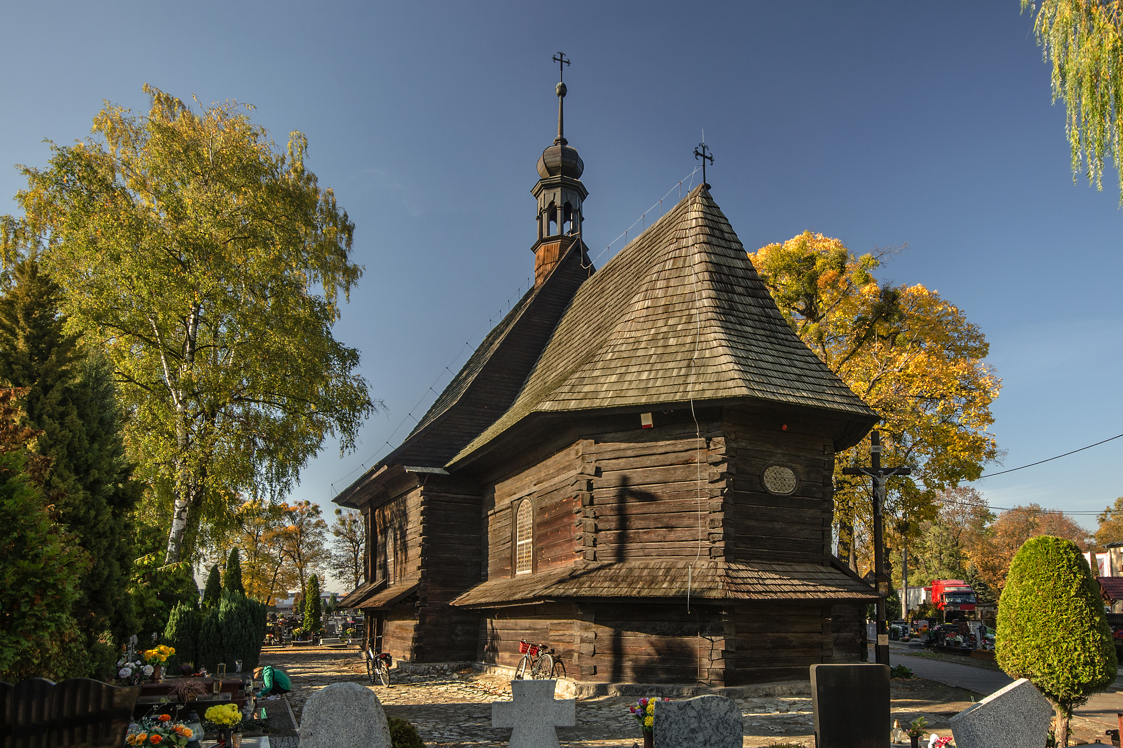 Strzelce Opolskie, kościół pw. św. Barbary, 1683-1690